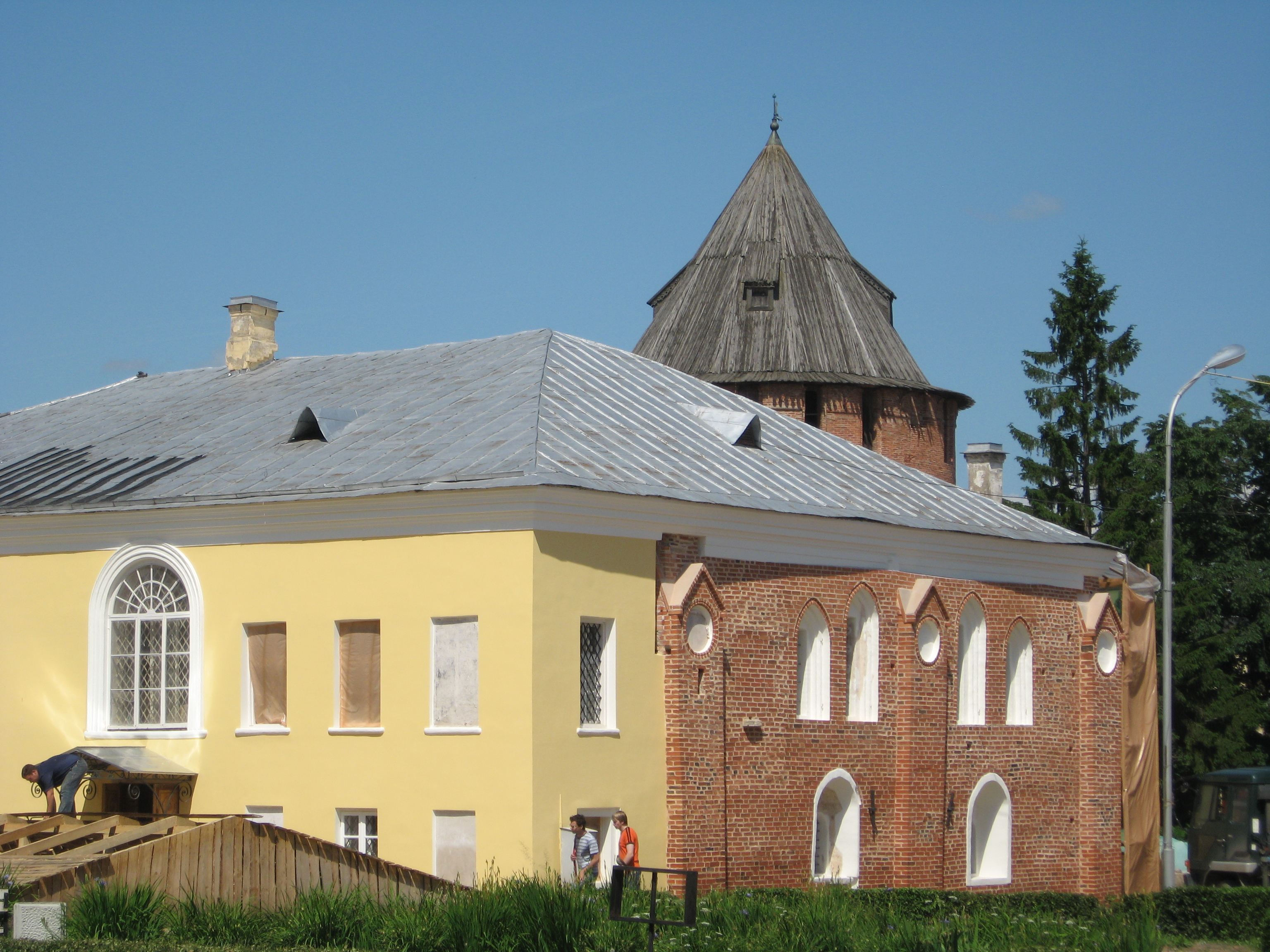 Владычная палата в Новгородском Детинце. 1433 год.